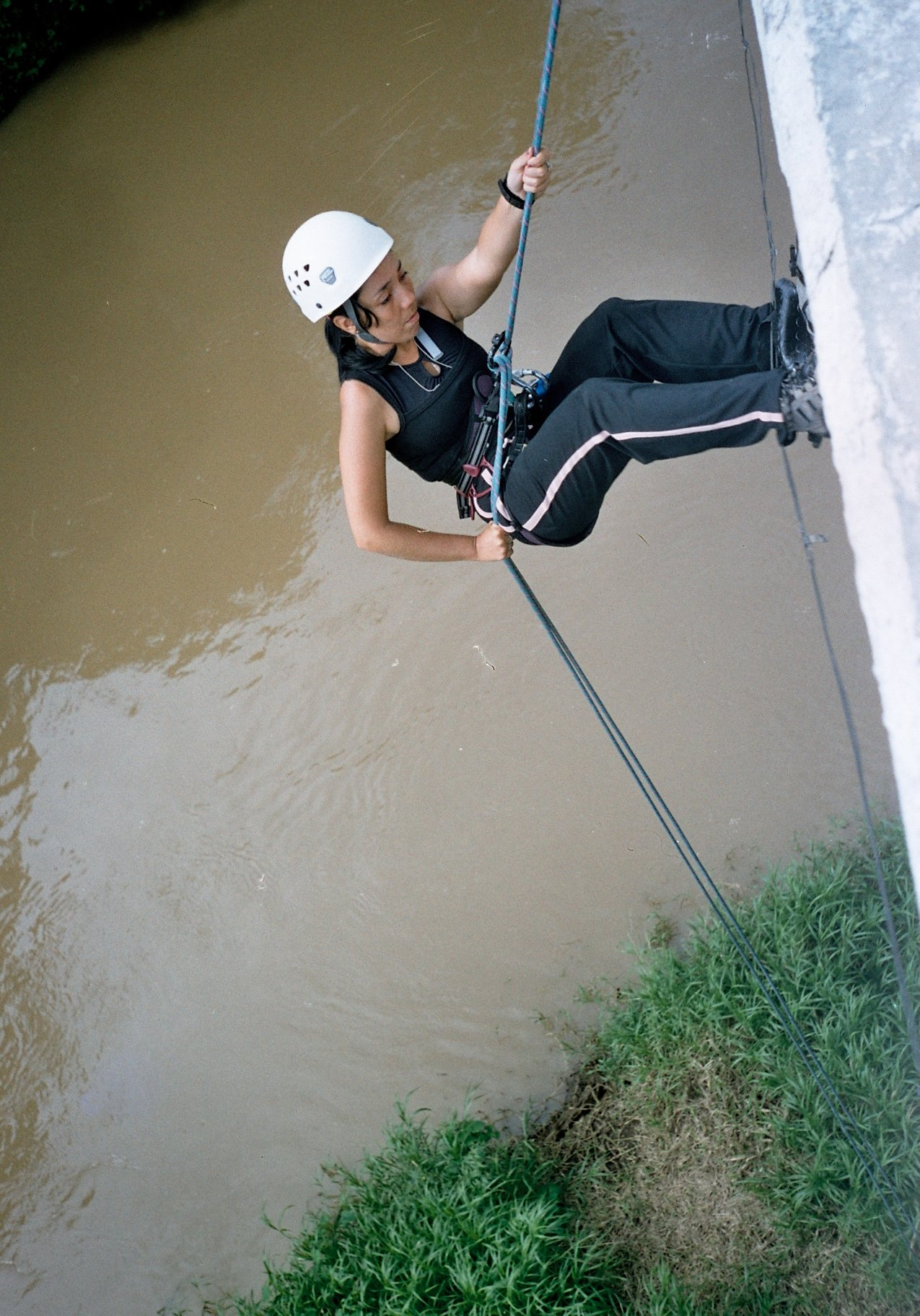 Abseil (rope downing) Spanish and Frech: Rappel Muchacha descendiendo por cuerda desde un puente, utiliza un ocho como descensor. La foto fue tomada apróximadamente en el año 2002 en Jamapa, Veracruz, México. En una excursión oficial del CEMAC Veracruz. Muchacha: Susana Torres Sánchez.